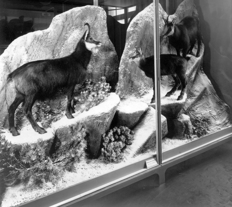 Museum Wiesbaden, MWNH, Naturhistorische Landessammlung, 1924 subject: Gemsengruppe im Hochgebirge